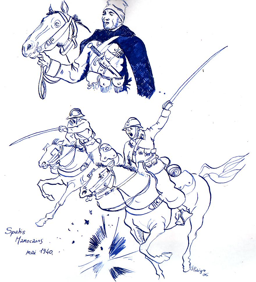 dessin personnel de [:fr:User:Jp.negre